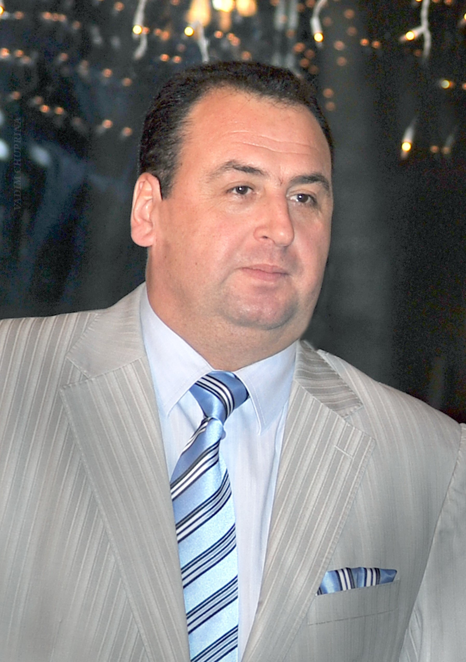 Данилец Владимир , фото Чуприна Вадим.